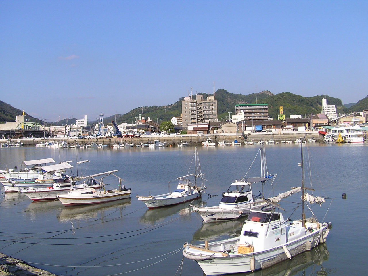 kasaoka port